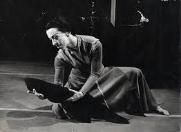 מתוך היצירה "נשים באוהל", 1966; כוריאוגרפיה: רינה גלוק, סט: דני קרוון (באדיבות להקת מחול בת-שבע)